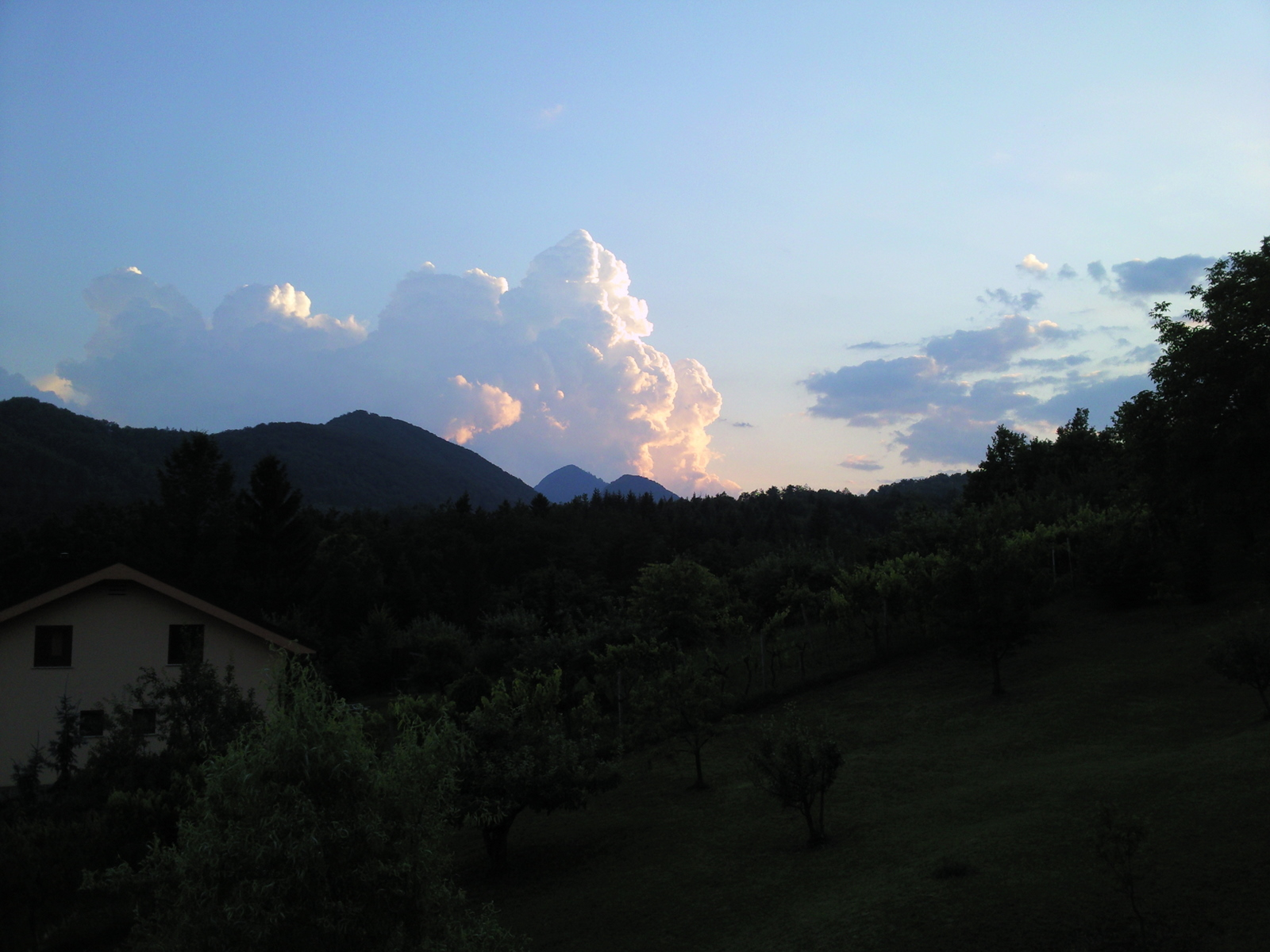 Košnica pri Celju, Sunset